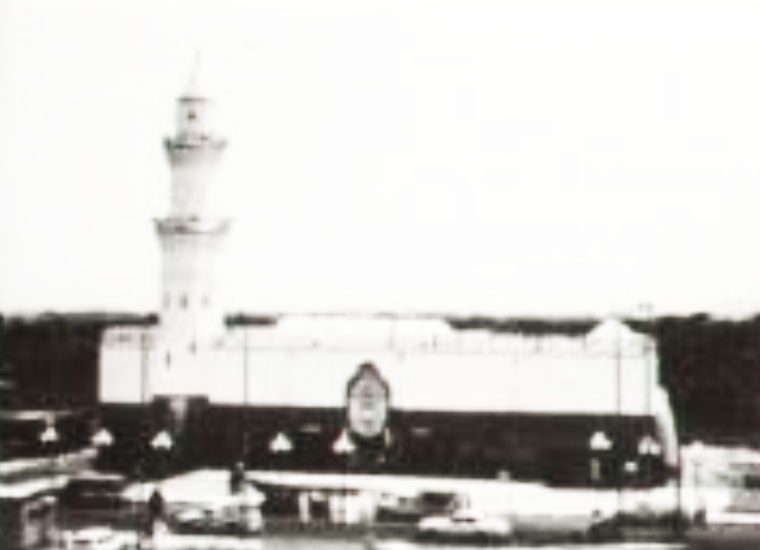 مسجد قباء قديما